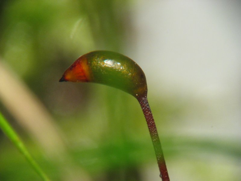 Brachythecium rutabulum, Sporogon bei 30x Vergrößerung, Rostock